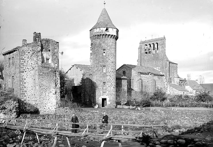 La tour et l'église Saint-Gal de Roffiac, photographiées par Séraphin-Médéric Mieusement.